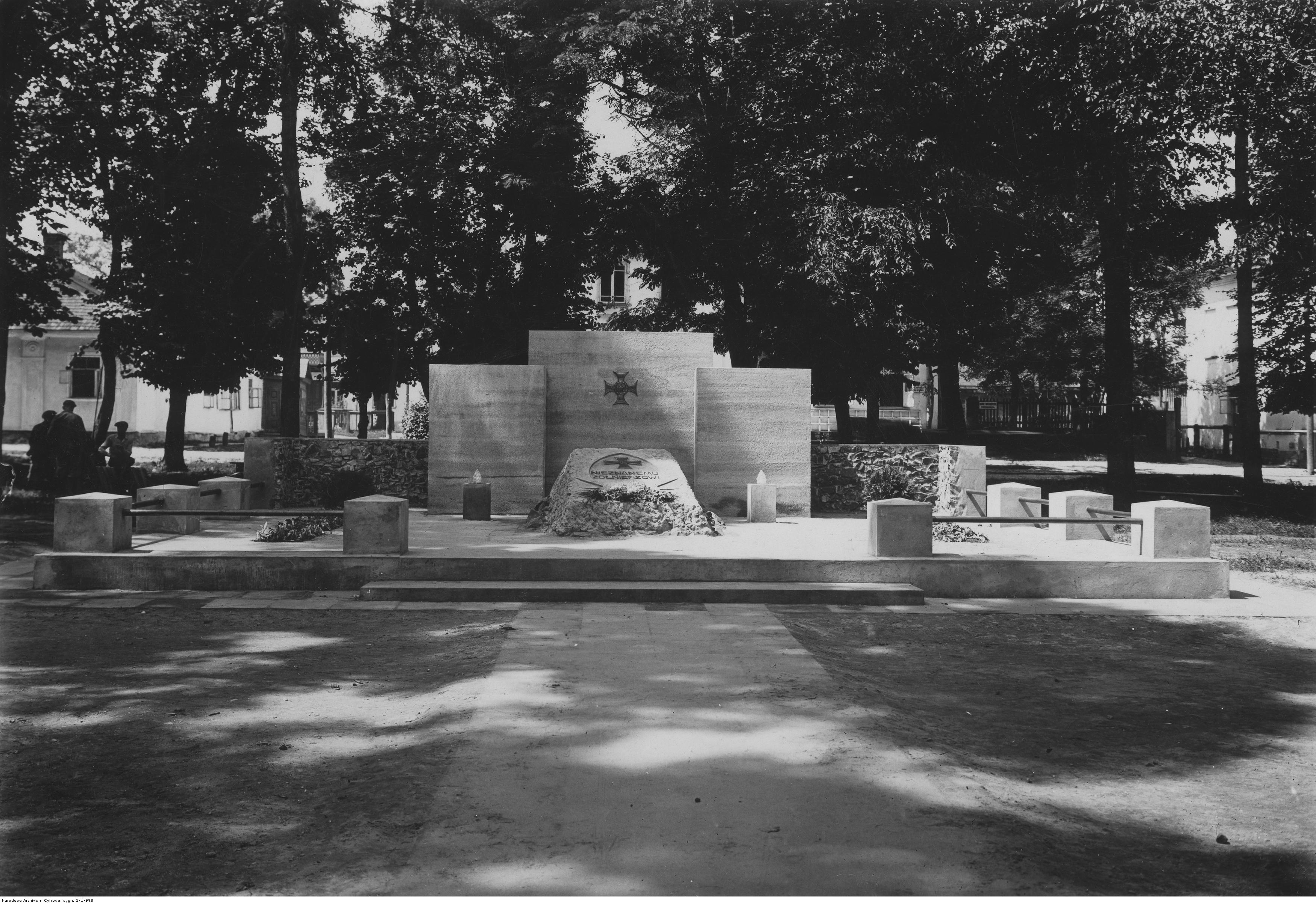 Dubno, województwo wołyńskie. Pomnik Nieznanego Żołnierza. Koncern Ilustrowany Kurier Codzienny - Archiwum Ilustracji. Sygnatura: 1-U-998